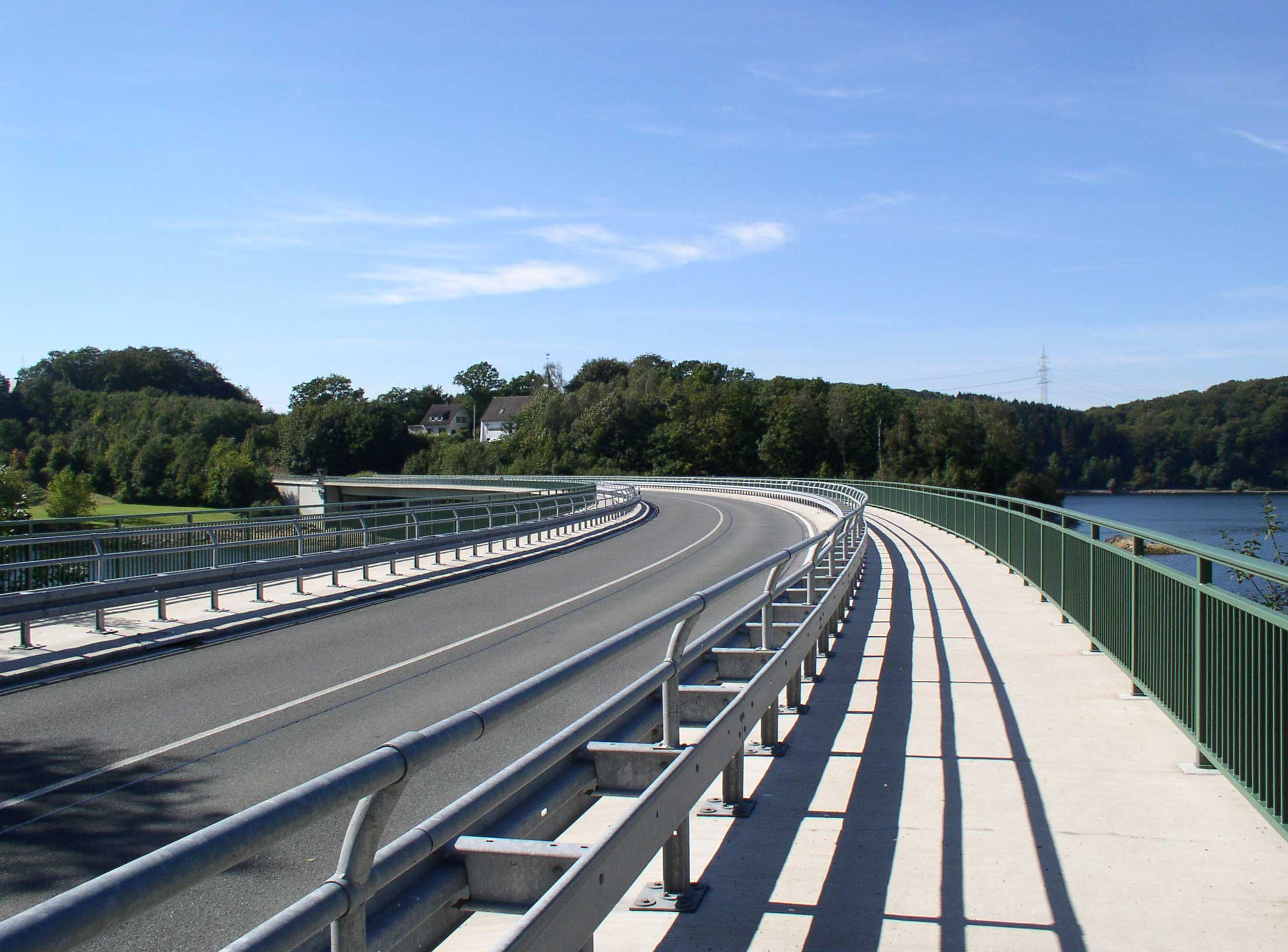 Blick über die Wupperbrücke auf Kräwinklerbrücke, Remscheid, NRW, Deutschland